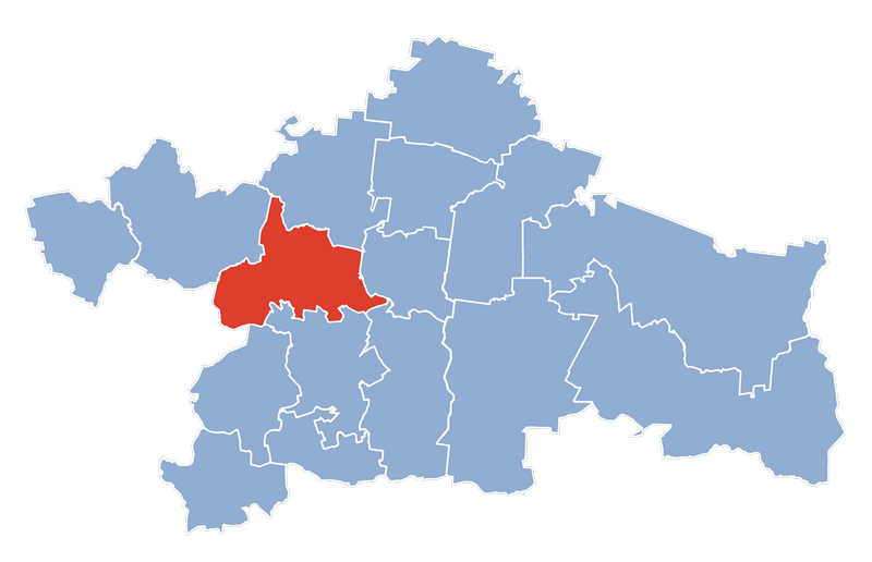 Gmina Choroszcz, powiat białostocki, województwo podlaskie (na podstawie danych z